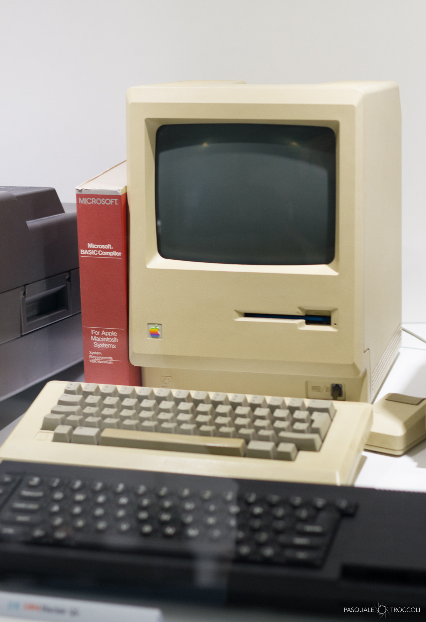 Machintosh